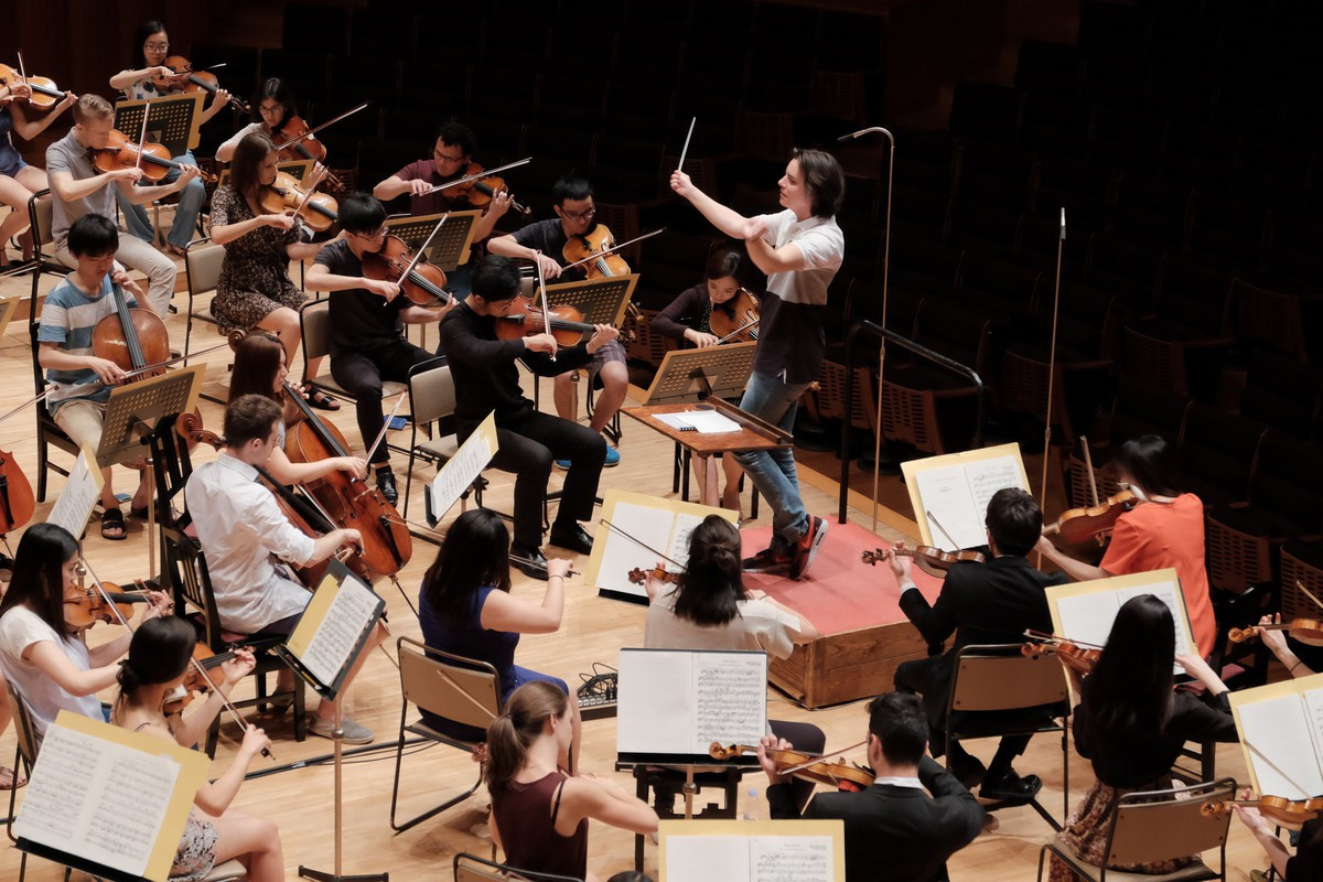 PMF